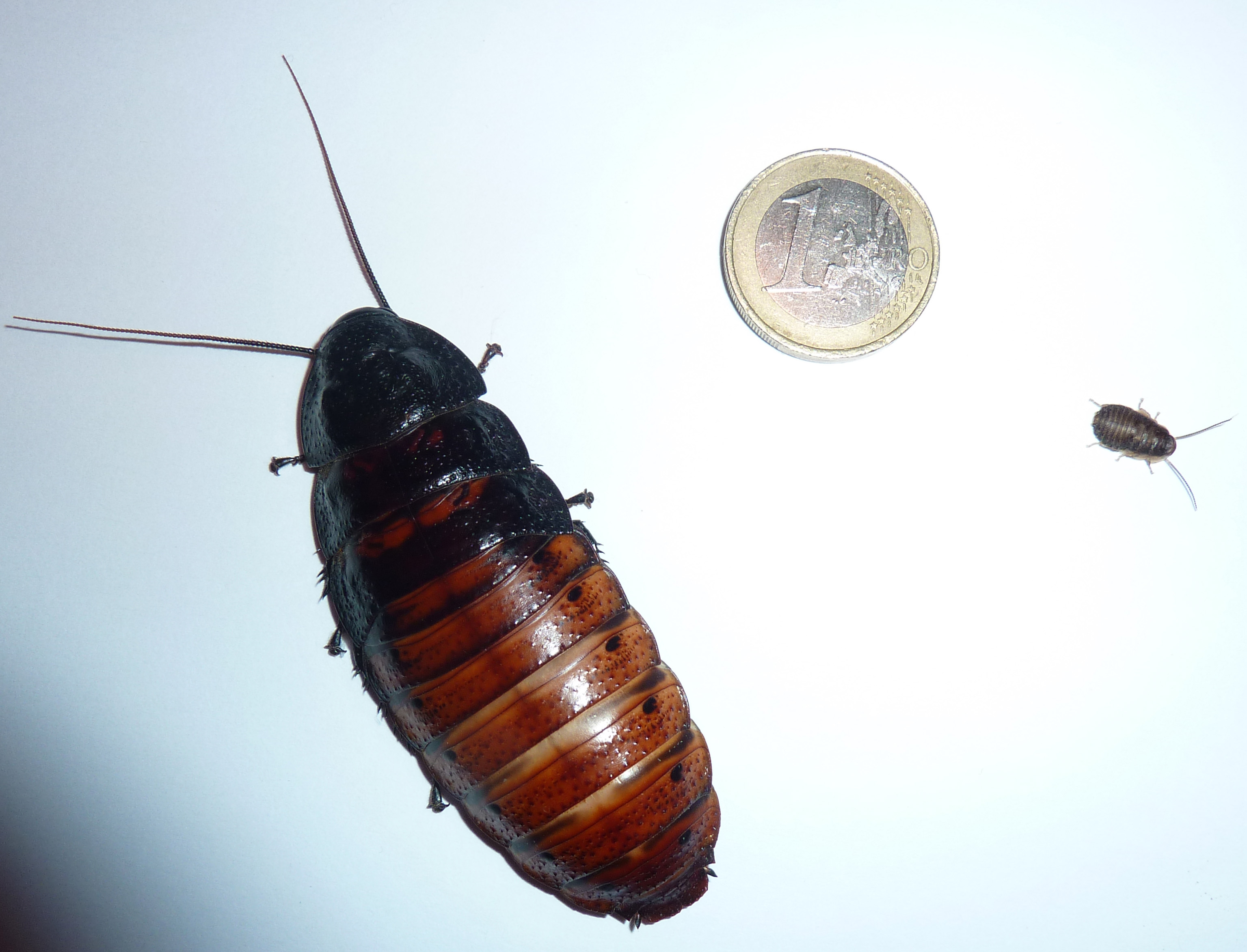 Comparaison entre une femelle adulte Gromphadorhina portentosa et un nouveau-né.